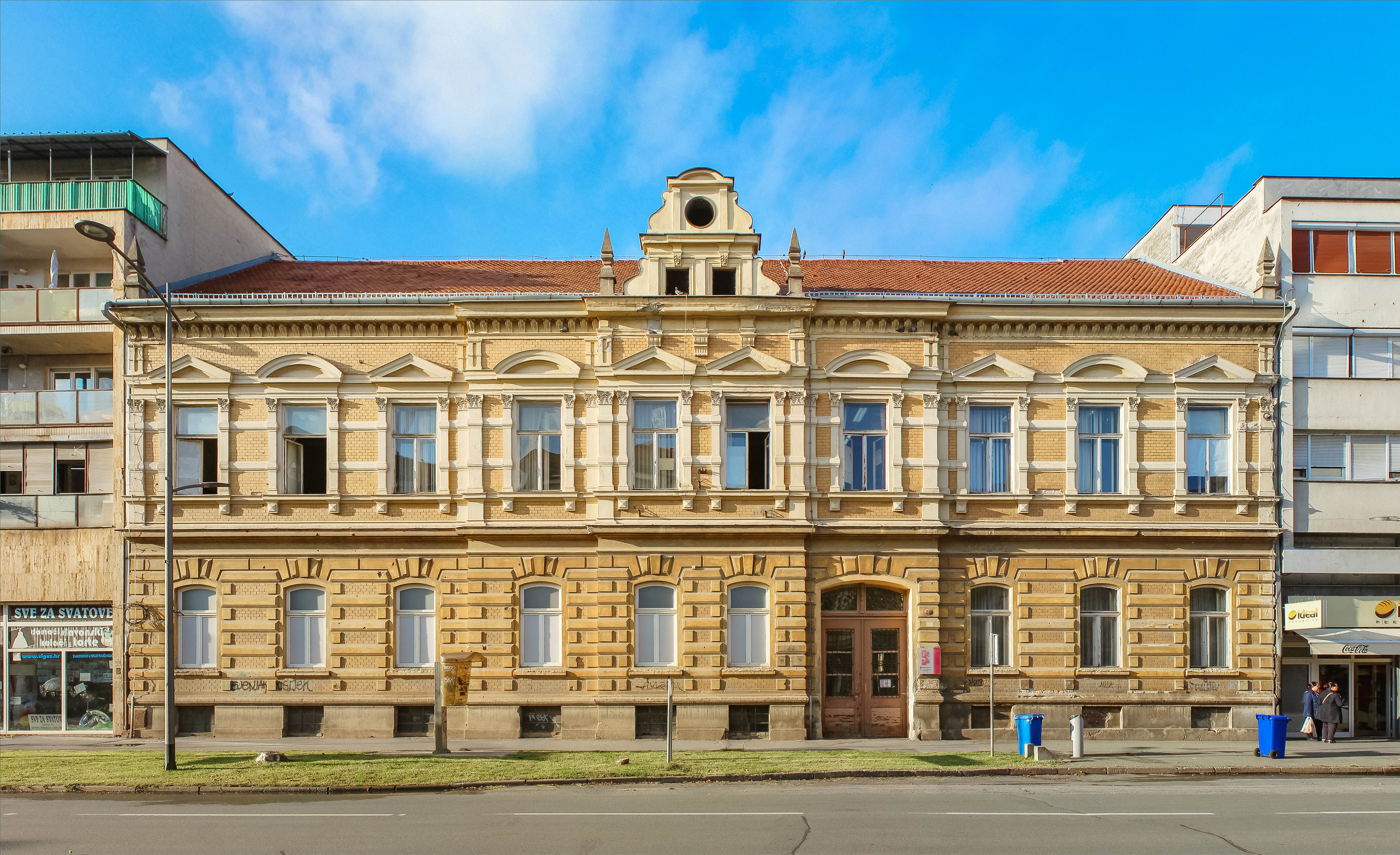 Zgrada Glasa Slavonije u Osijeku